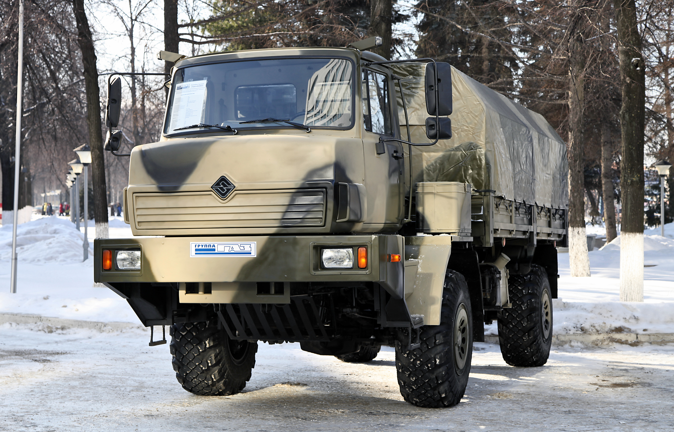 Автомобиль бортовой Урал-432065 (Ural-432065)